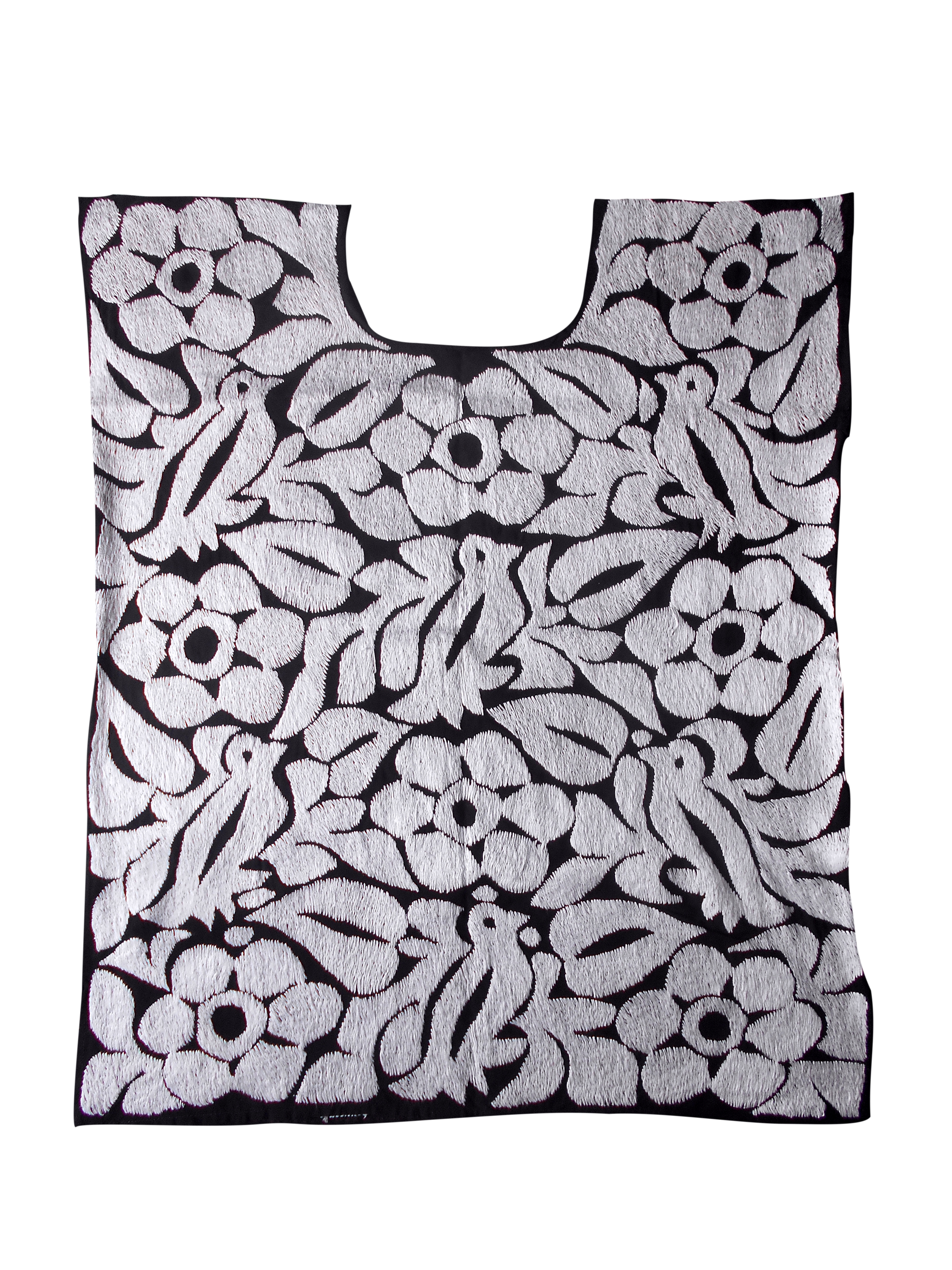 Blusa típica de San Felipe Jalapa de Díaz, elaborada con hilo de algodón y tela rayón. Básicamente, la iconografía consiste en pájaros, flores y hojas de la región mazateca.